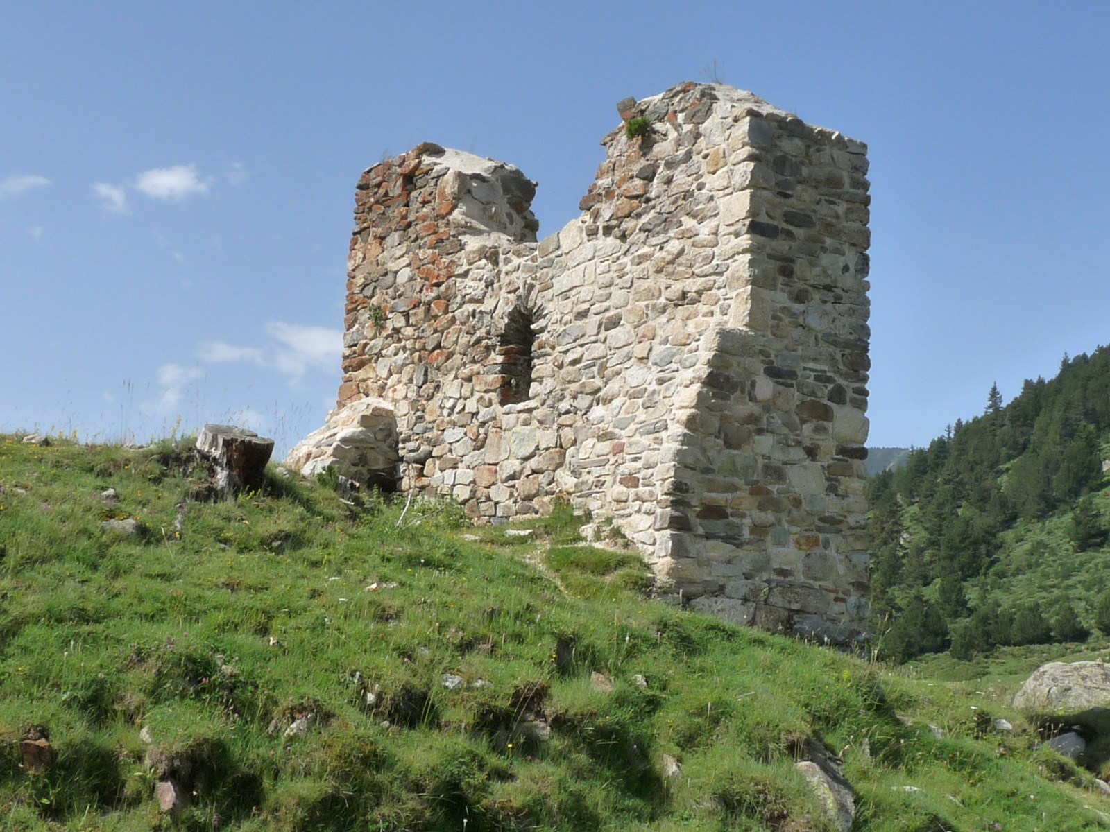 Petite église de Balcère, Les Angles, Pyrénées-Orientales, France